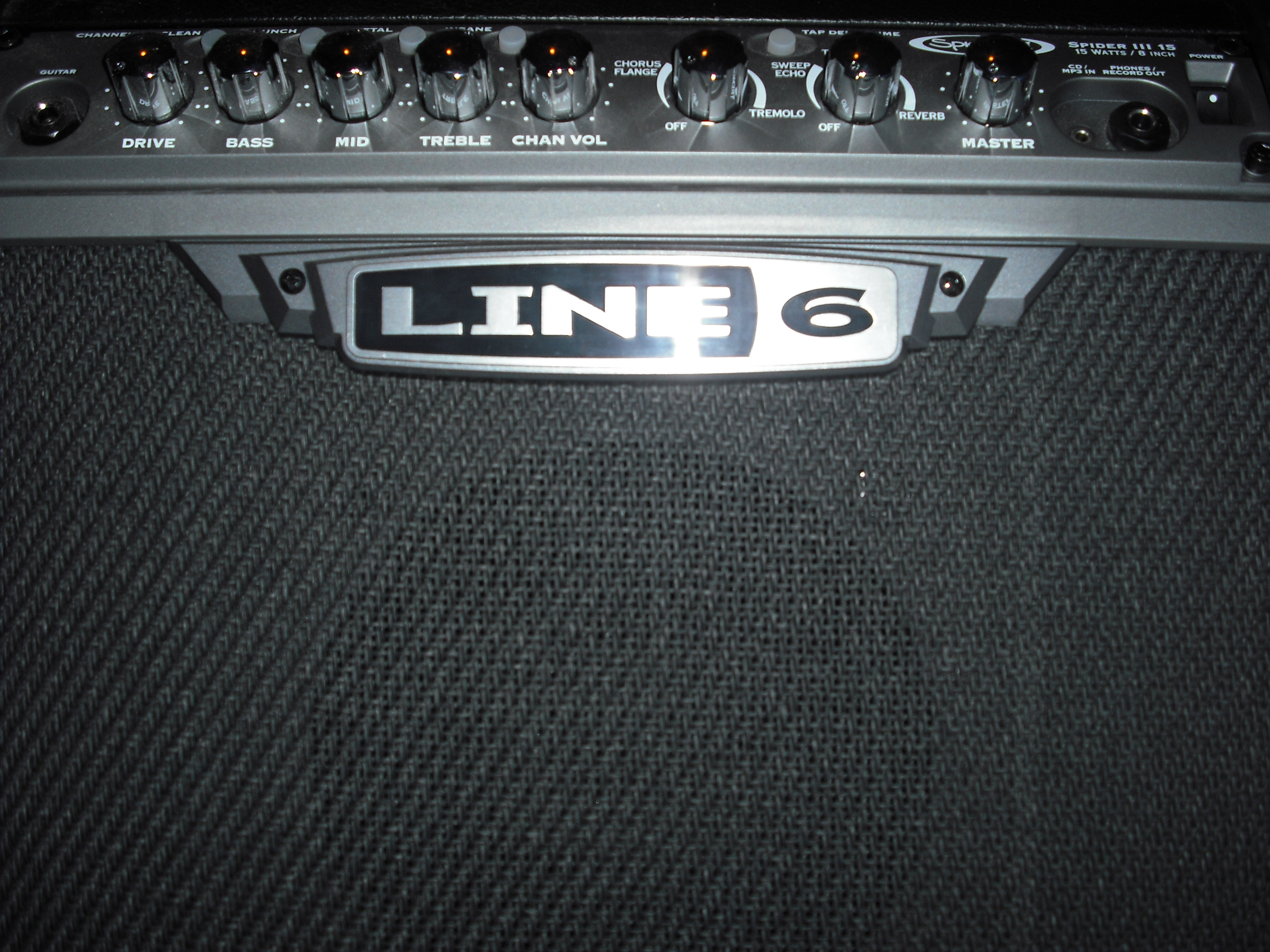 Line 6 Amp